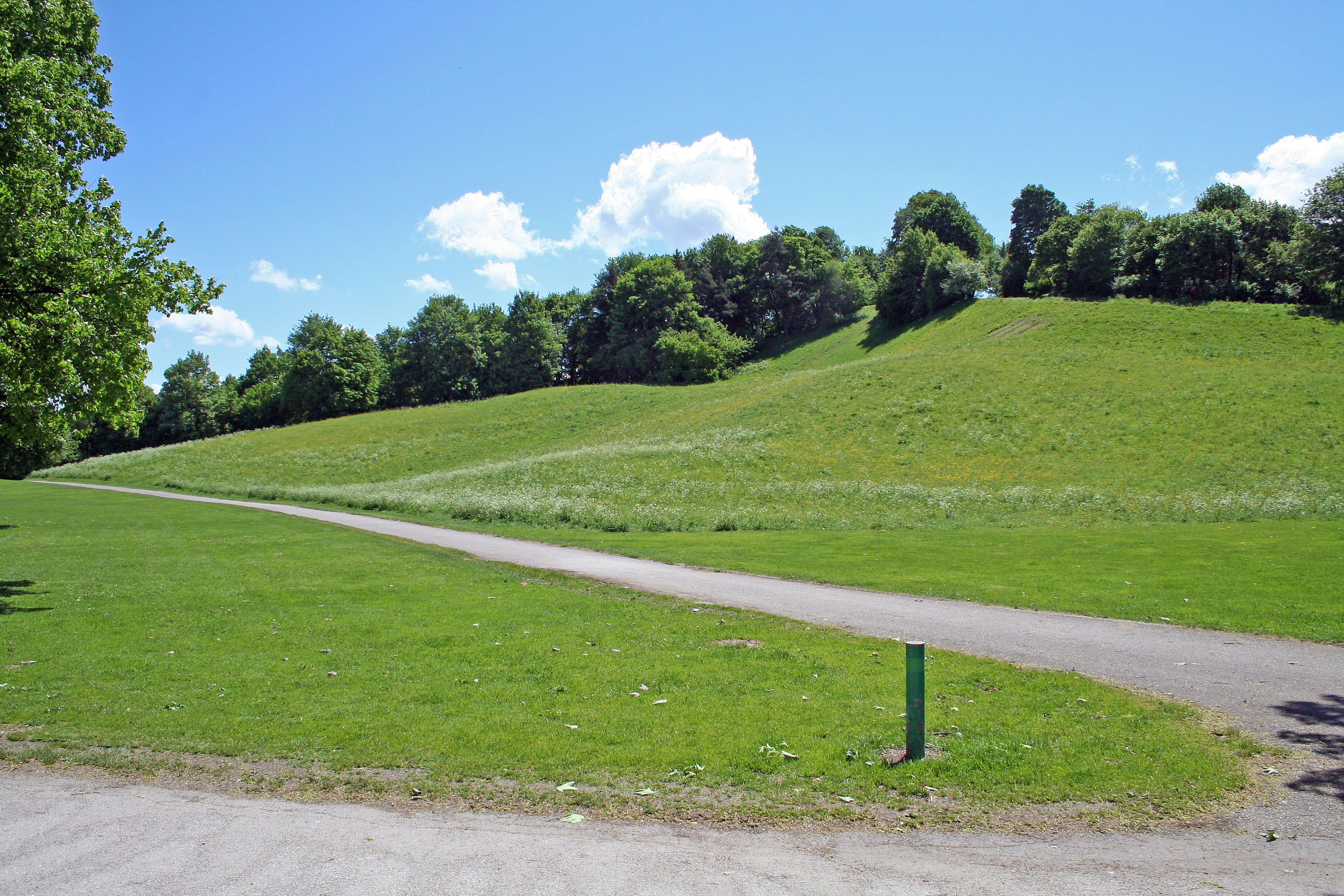 Luitpoldhügel in München